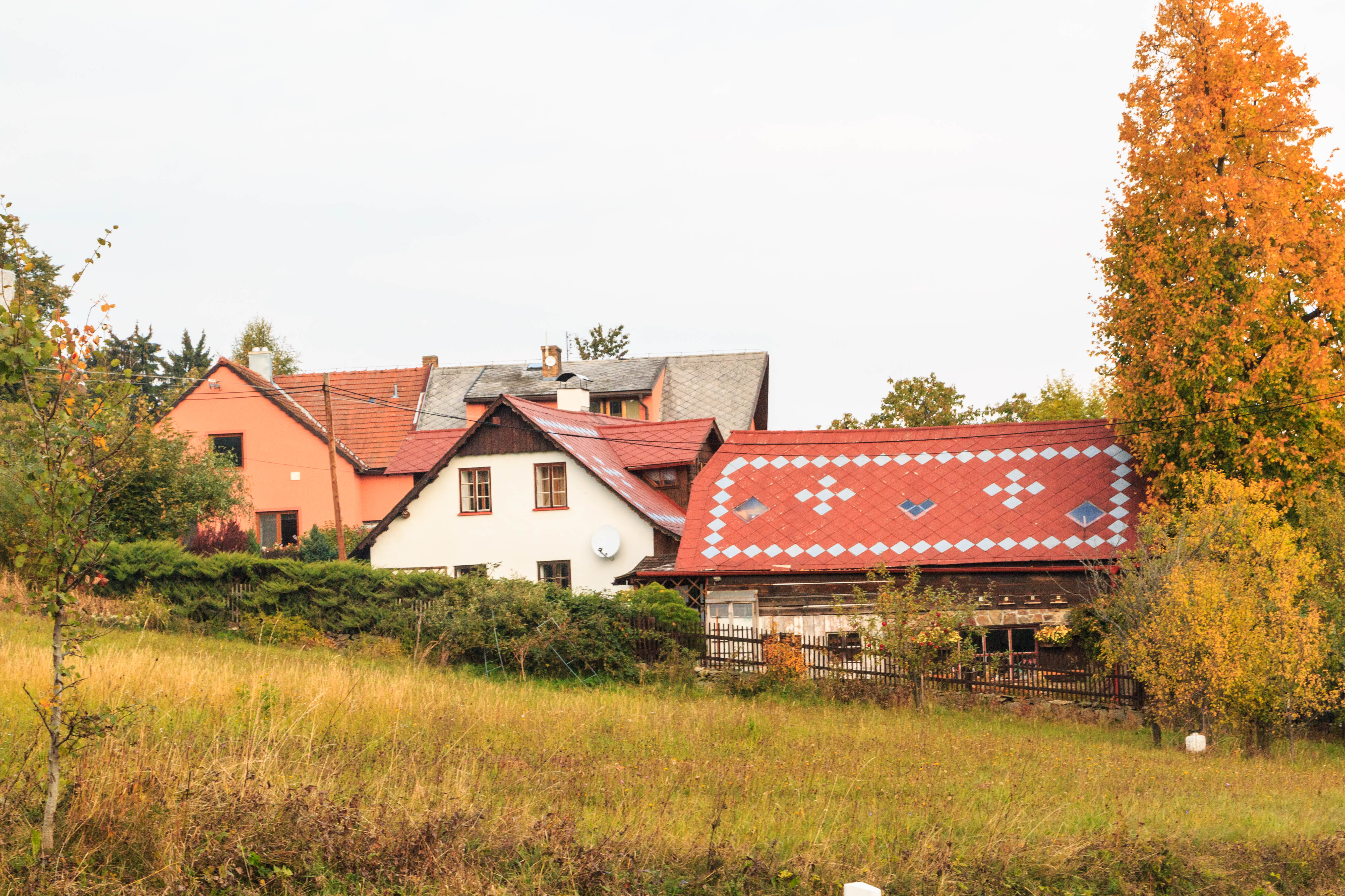 Dvorec u Radhostic - čp. 23